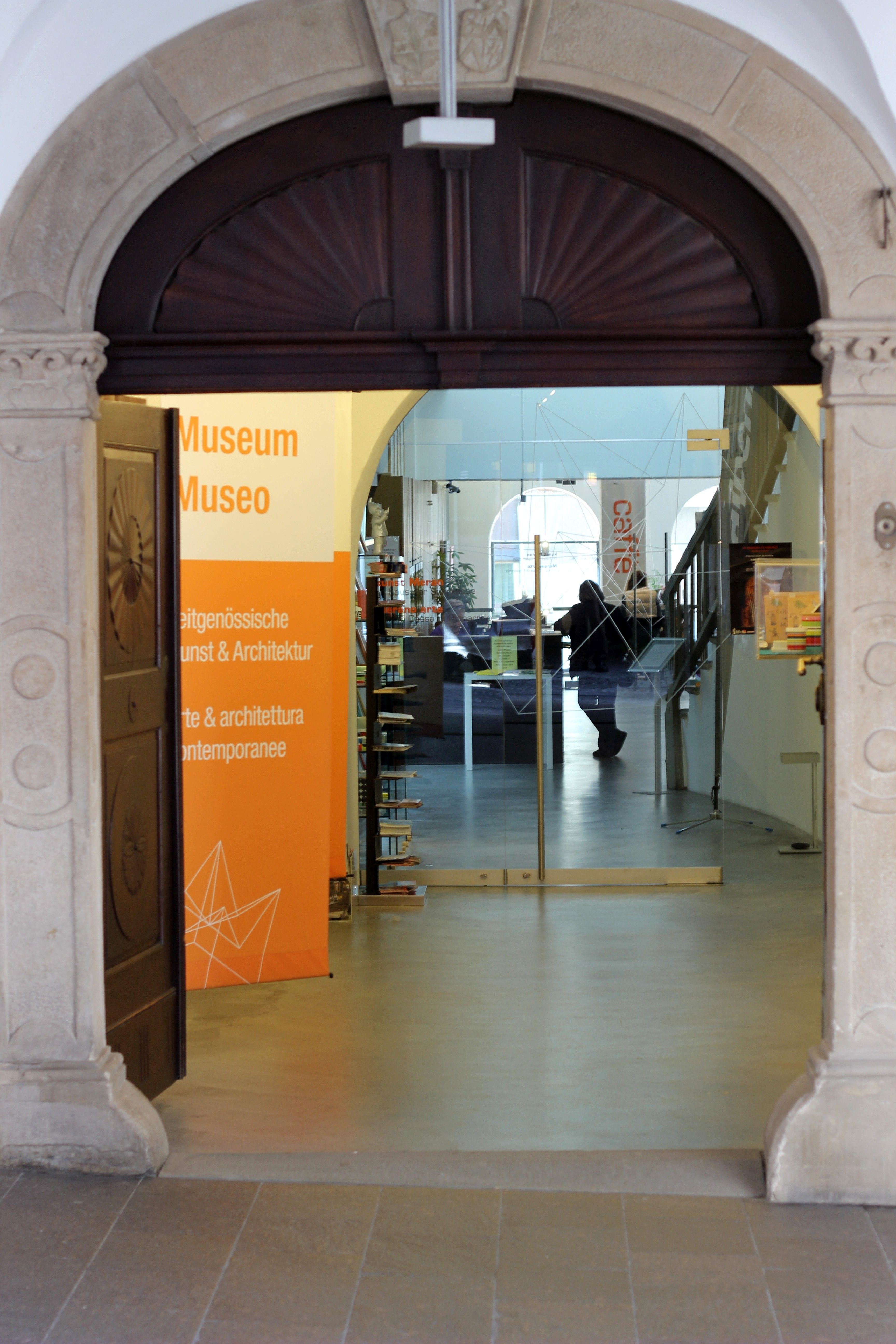 Lauben 163 (Kunsthaus) in Meran